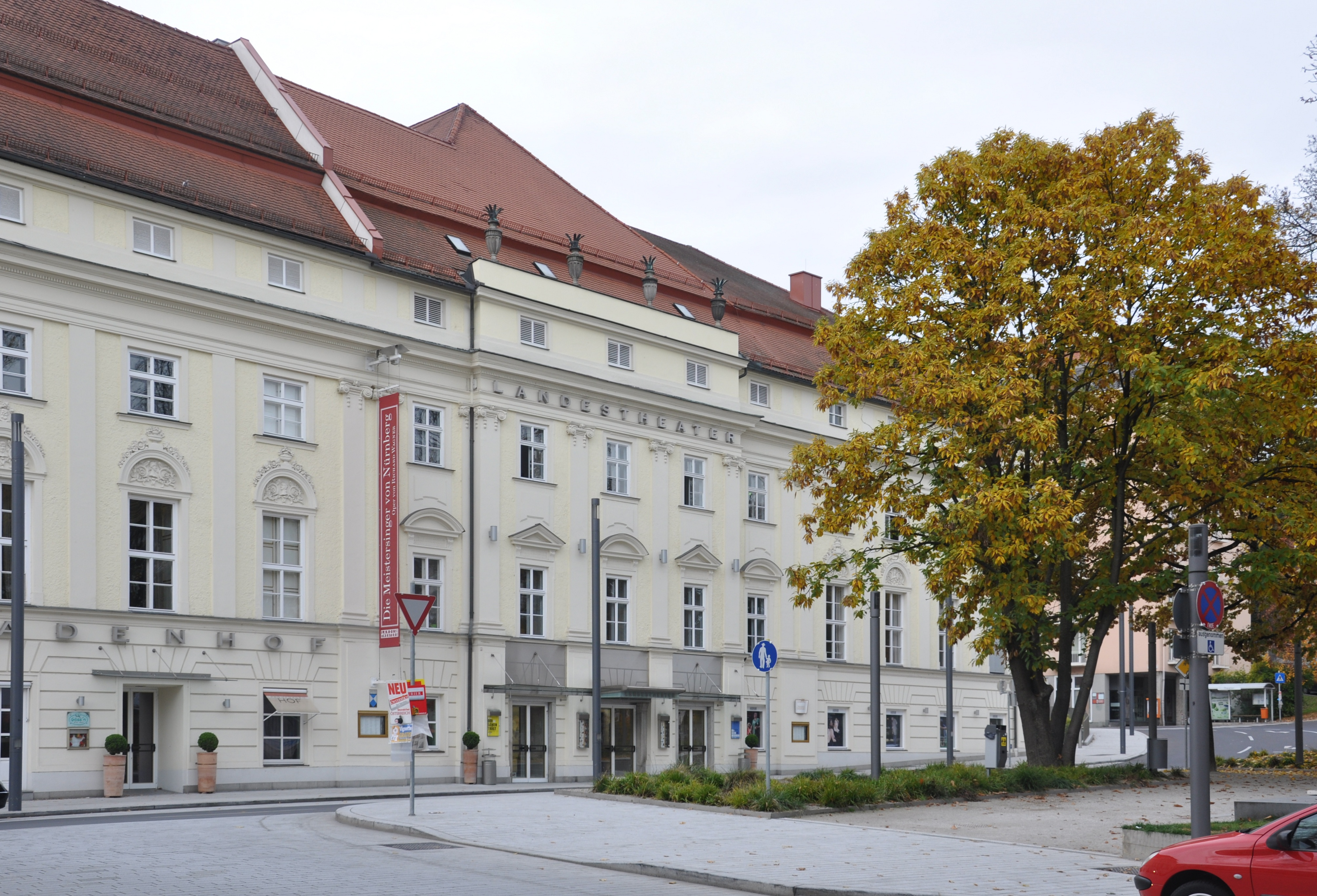 Landestheater Linz Großes Haus